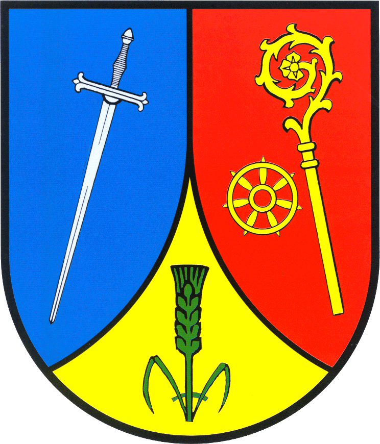 Wappen Filz (Eifel) Quelle